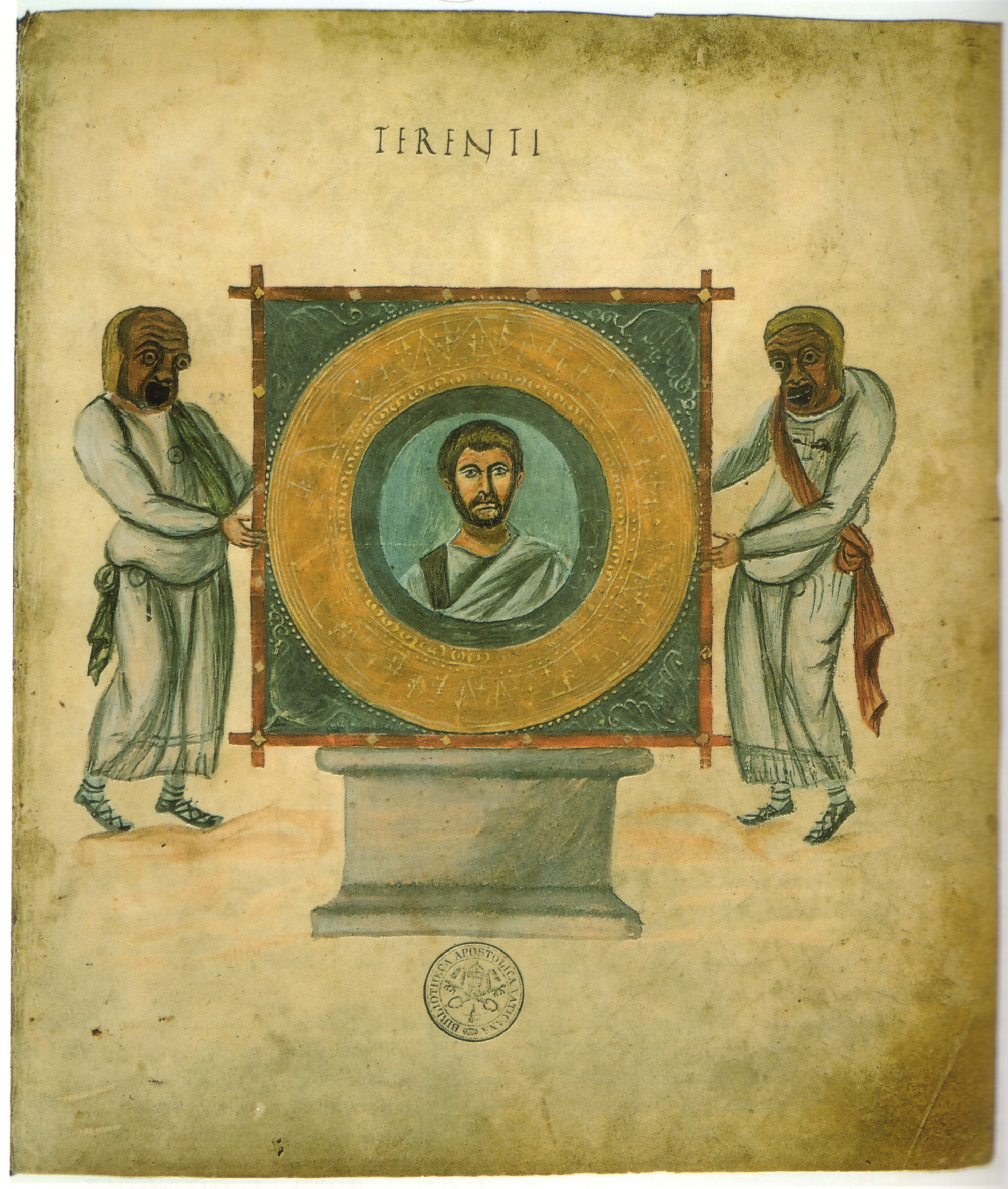 Vaticana, Vat. lat. 3868 (2r) Lotharingien (Aachen?), um 825 Autorenporträt Terenz